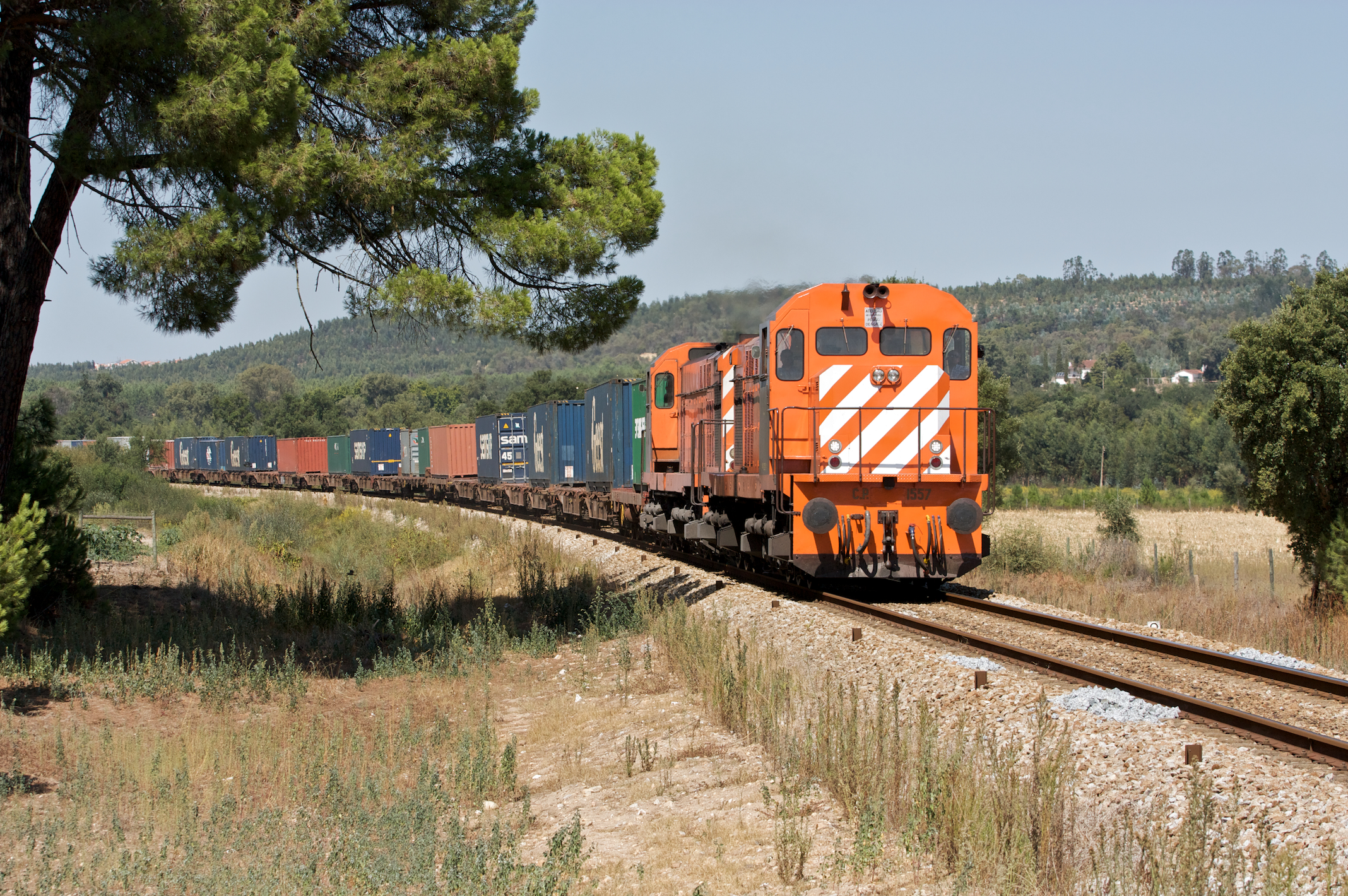 Tipo: Comboio de Distribuição 75375 (transporte de contentores) [Entroncamento - Badajoz] Local: Bemposta [Linha do Leste, PK 142] Data e hora: 15 de Setembro de 2009 [13h27] Material: Locomotivas 1557 e 1556 + xx vagões CP Sggmrss esta fotografia foi publicada no .